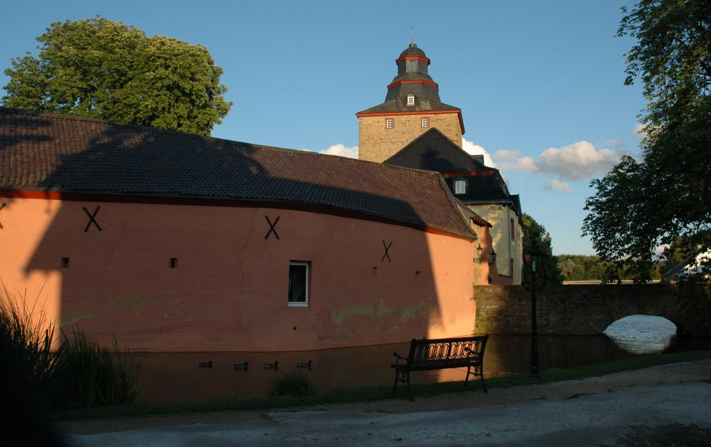 Burg Kirspenich mit Brücke und Wassergraben